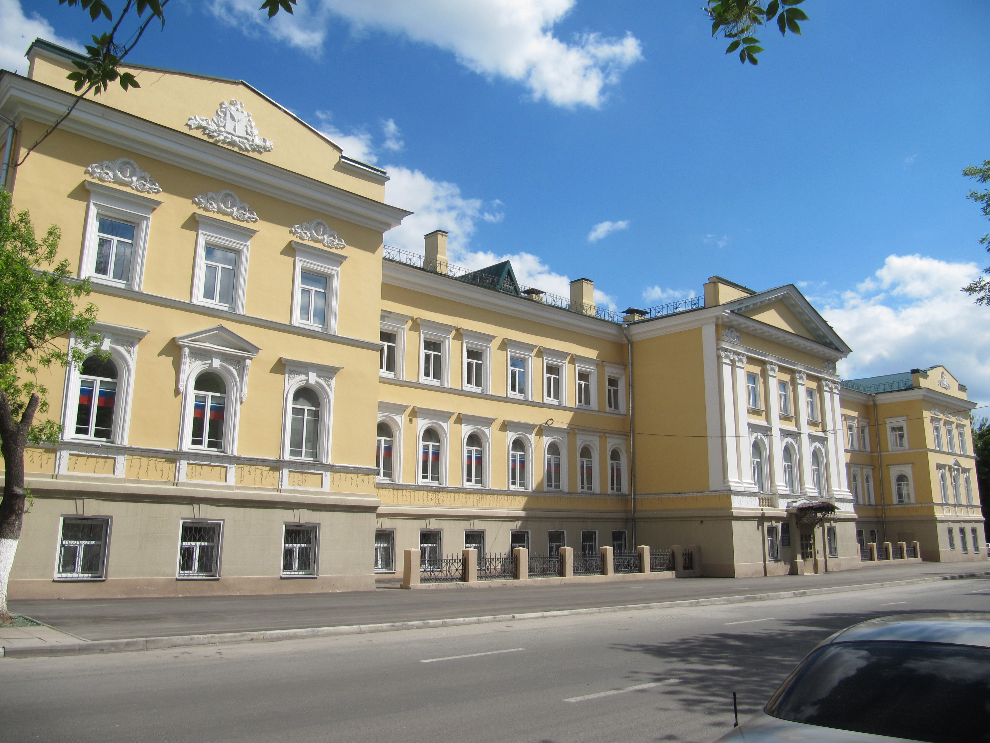 Здание присутственных мест: улица Радищева, 22, Саратов, Саратовская область